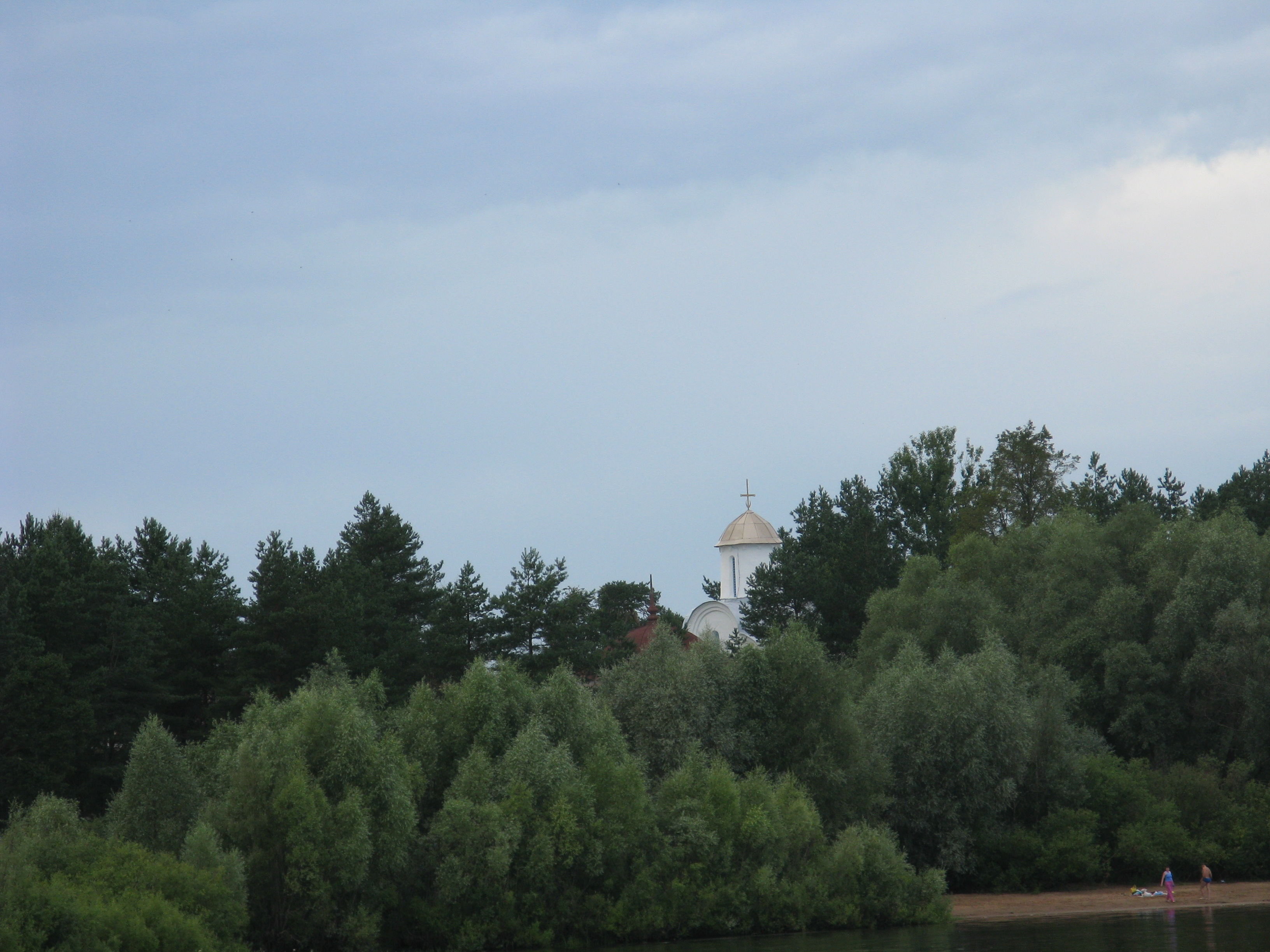 Перынский монастырь (Перынский скит) (Новгородская область, Великий Новгород, Перынь, 2 км южнее Юрьева монастыря).